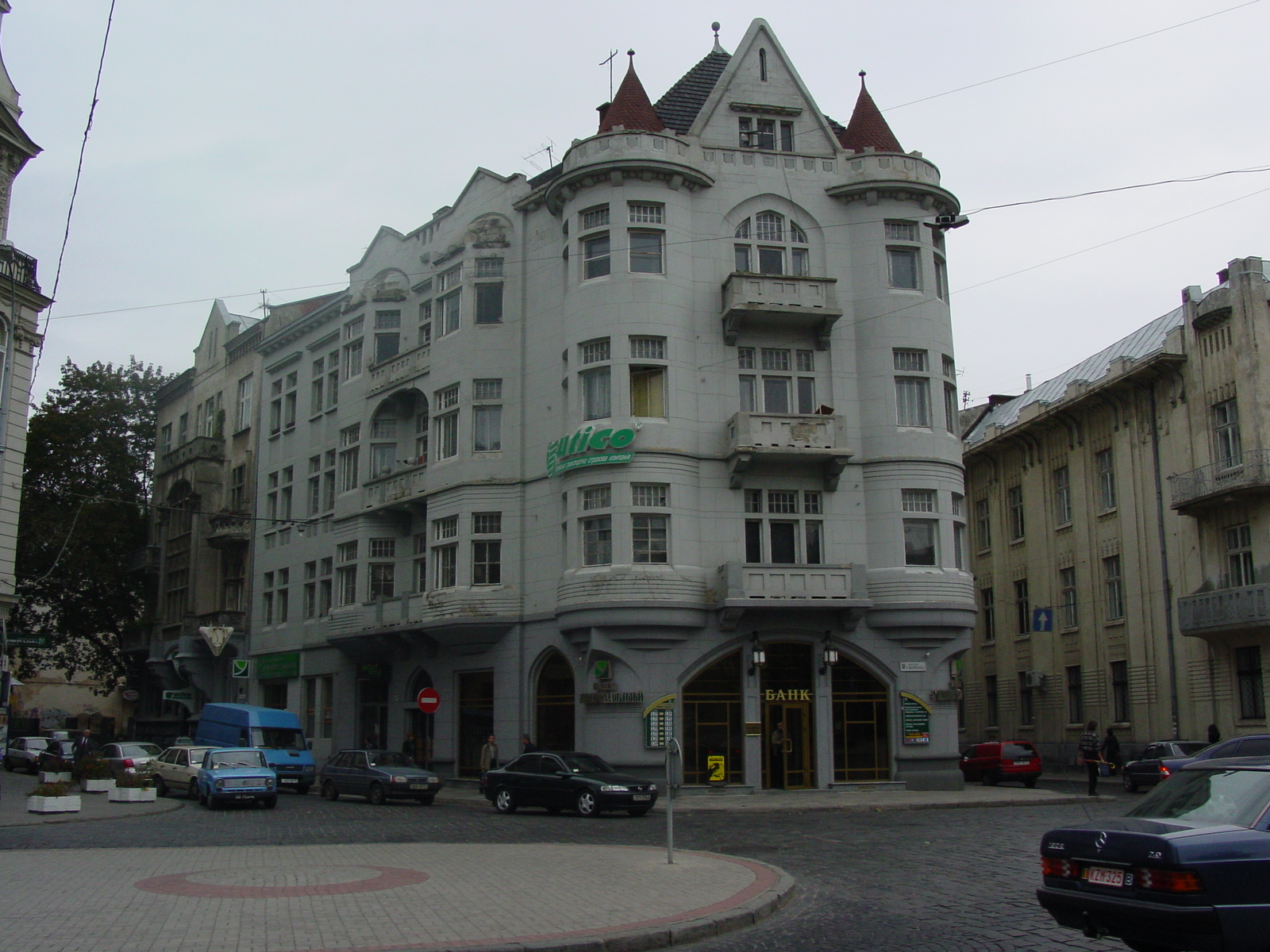 Lwów. Budynek na Akademickiej, w którym przez II wojną mieściła się słynna Kawiarnia Szkocka. Wrzesień 2003. Autor: Stanisław Kosiedowski